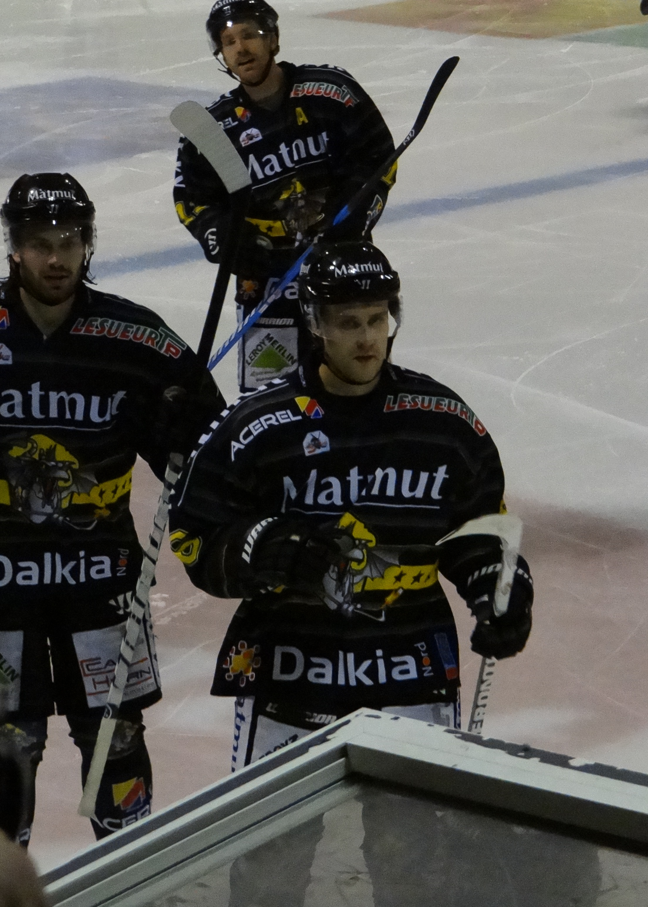 Photographie du joueur lors d'un match de Rouen contre Amiens